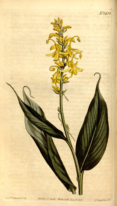 Globba sessiliflora Sims Planche 1428 du Curtis's Botanical Magazine Vol 35 année 1811